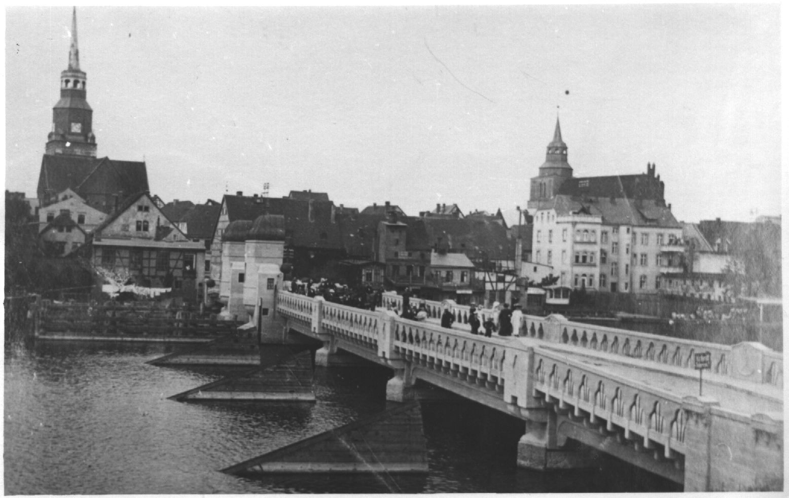 Wolin w okresie międzywojennym